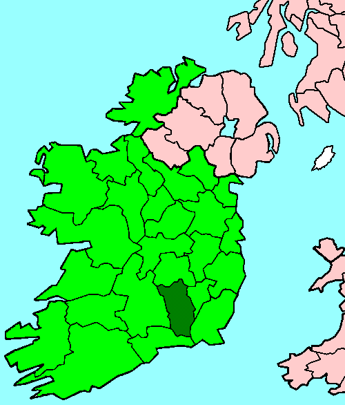 Kilkenny